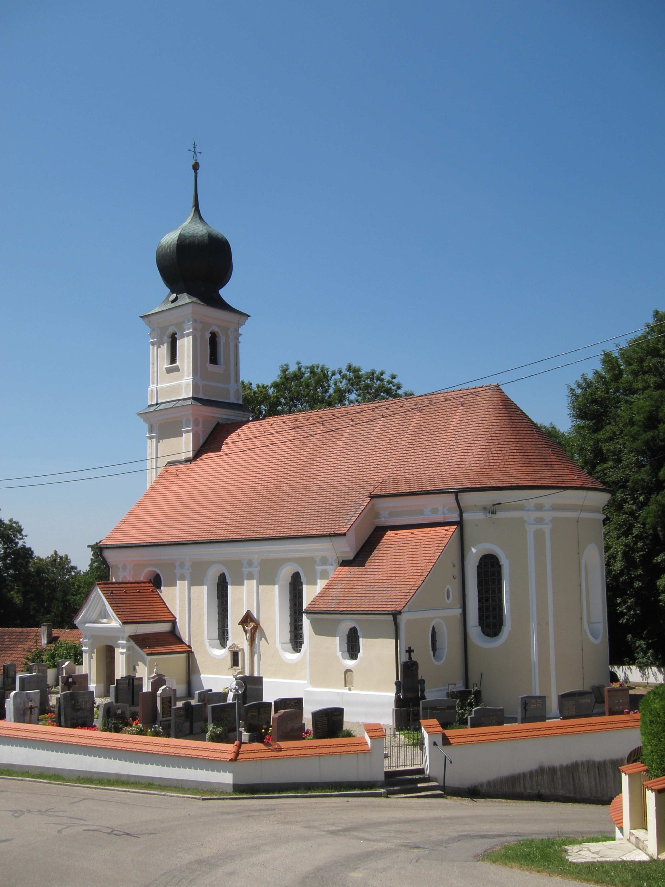 Watzling 4; katholische Filial- und Kuratiekirche St. Nikolaus, Saalbau mit eingezogener Apsis, angefügter Sakristei und Westturm mit Zwiebelhaube, Vorgängerbau 1670 durch Hans Kogler umgebaut, weitere Umbauten durch Anton Kogler 1710.